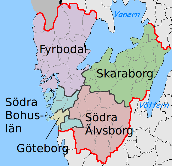 Västra Götaland County parts